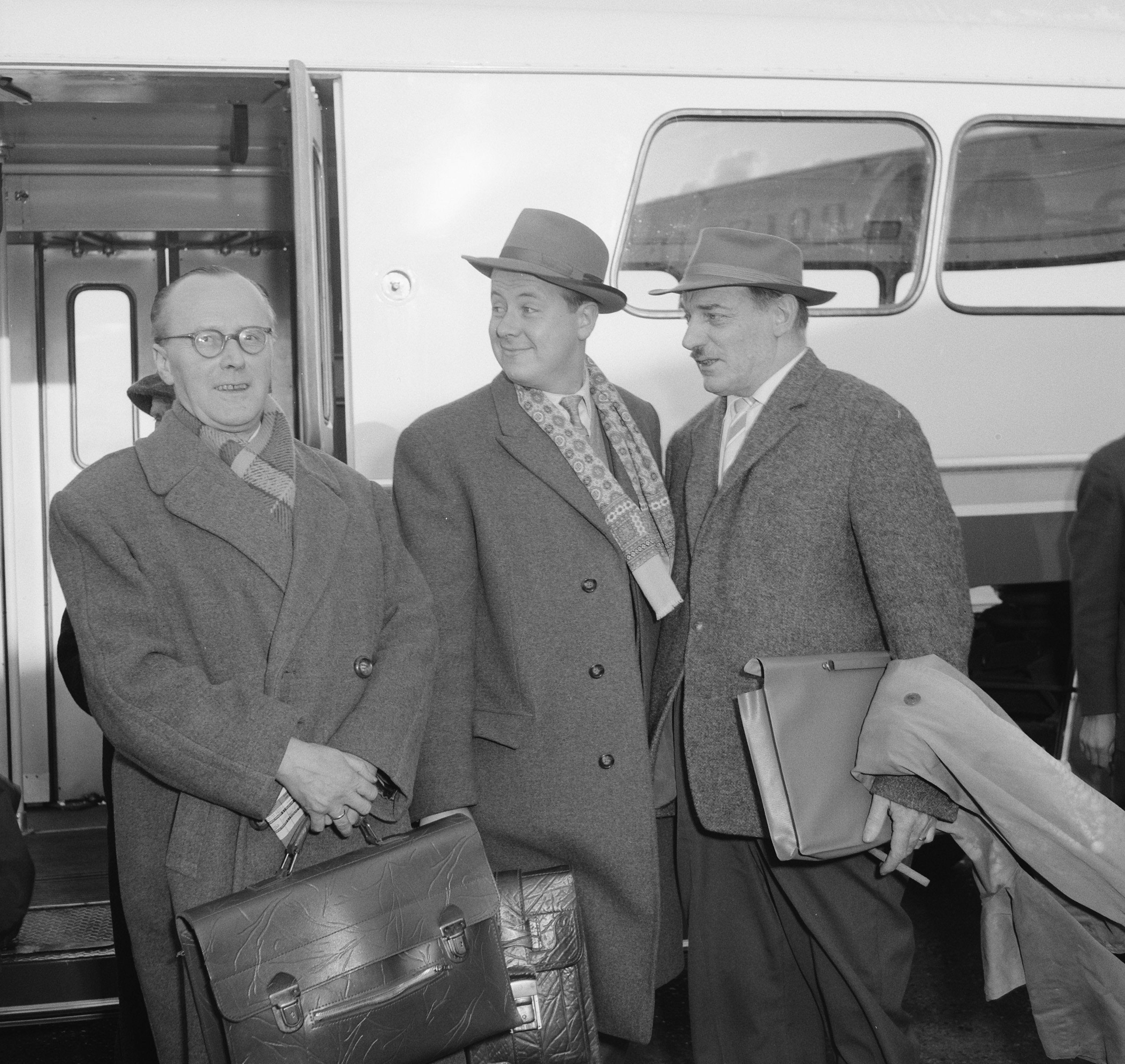 Collectie / Archief : Fotocollectie Anefo Reportage / Serie : [ onbekend ] Beschrijving : Aankomst en vertrek van Oost Duitse schaker Uhlmann Datum : 18 november 1960 Trefwoorden : aankomsten, schakers, vertrekken Fotograaf : Lindeboom, Henk / Anefo Auteursrechthebbende : Nationaal Archief Materiaalsoort : Negatief (zwart/wit) Nummer archiefinventaris : bekijk toegang 2.24.01.03 Bestanddeelnummer : 911-7935